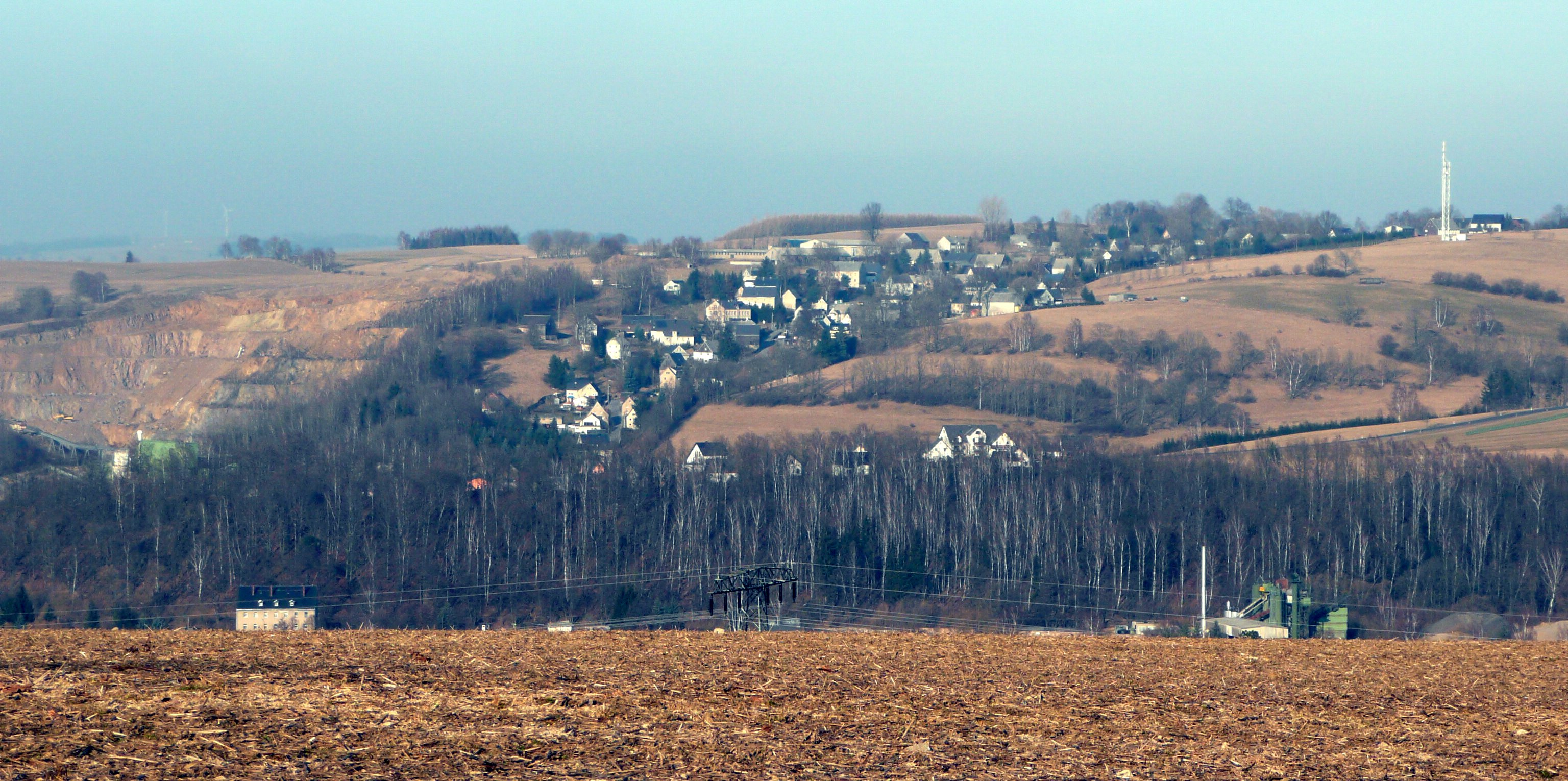 Blick auf den Pockauer Ortsteil Görsdorf mit dem markantem Steinbruch - Blick von der Vollebene südwestlich von Pockau